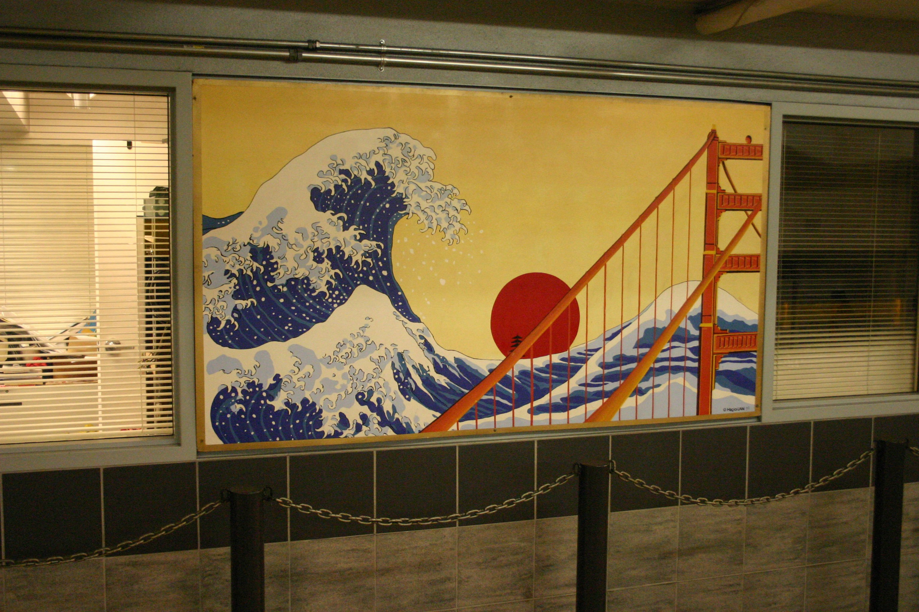 versión modificada de "La gran ola e Kanagawa" de Hokusai